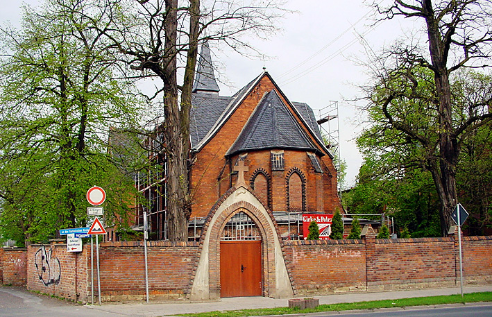 Katholische Kirche „St. Norberti“ 2002